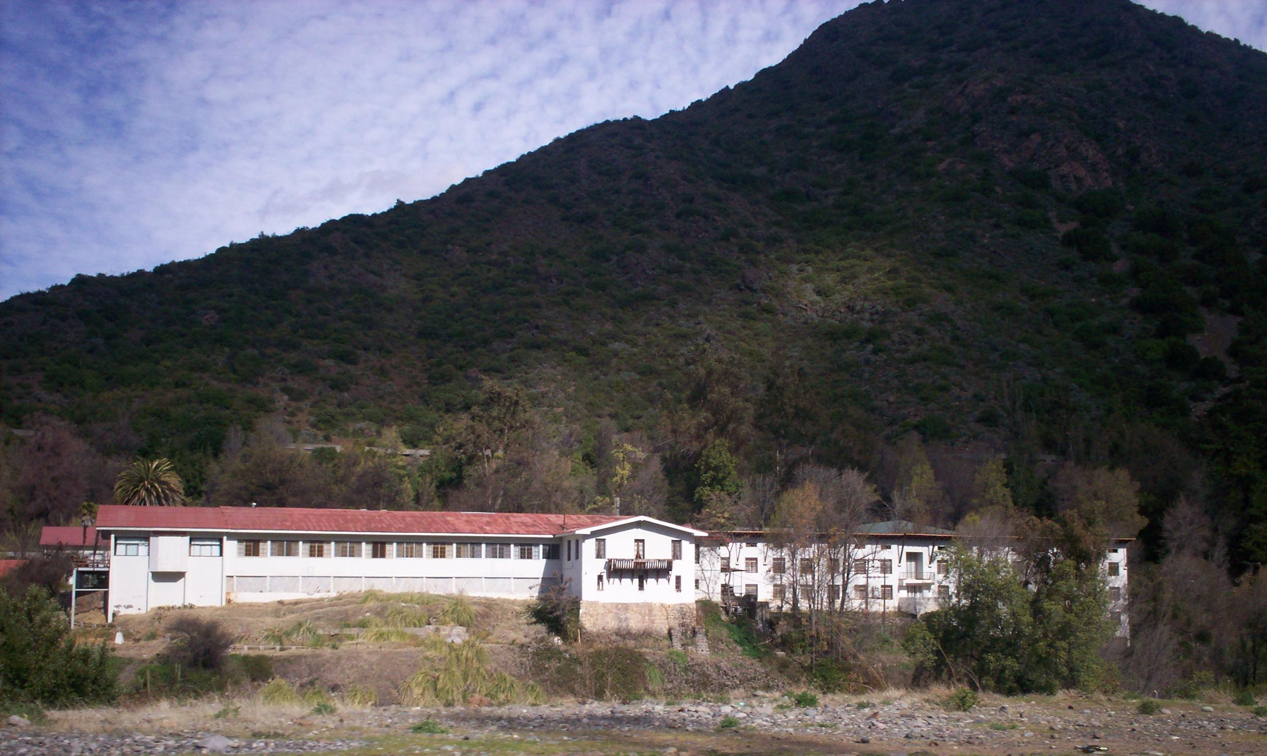 Termas de Cauquenes, Machalí, Chile